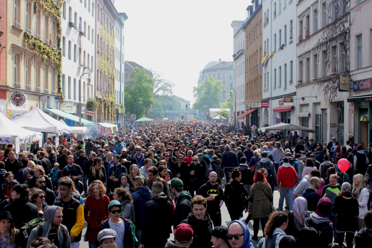 Myfest 2015